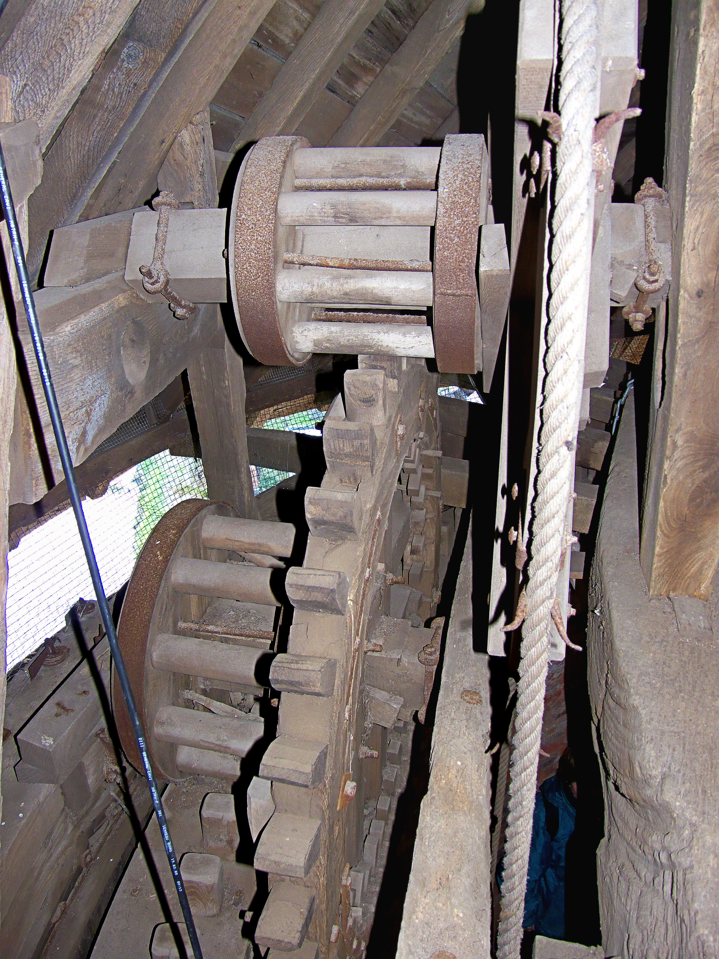 Molen Turmwindmühle Werth, Duitsland: kruiwerk